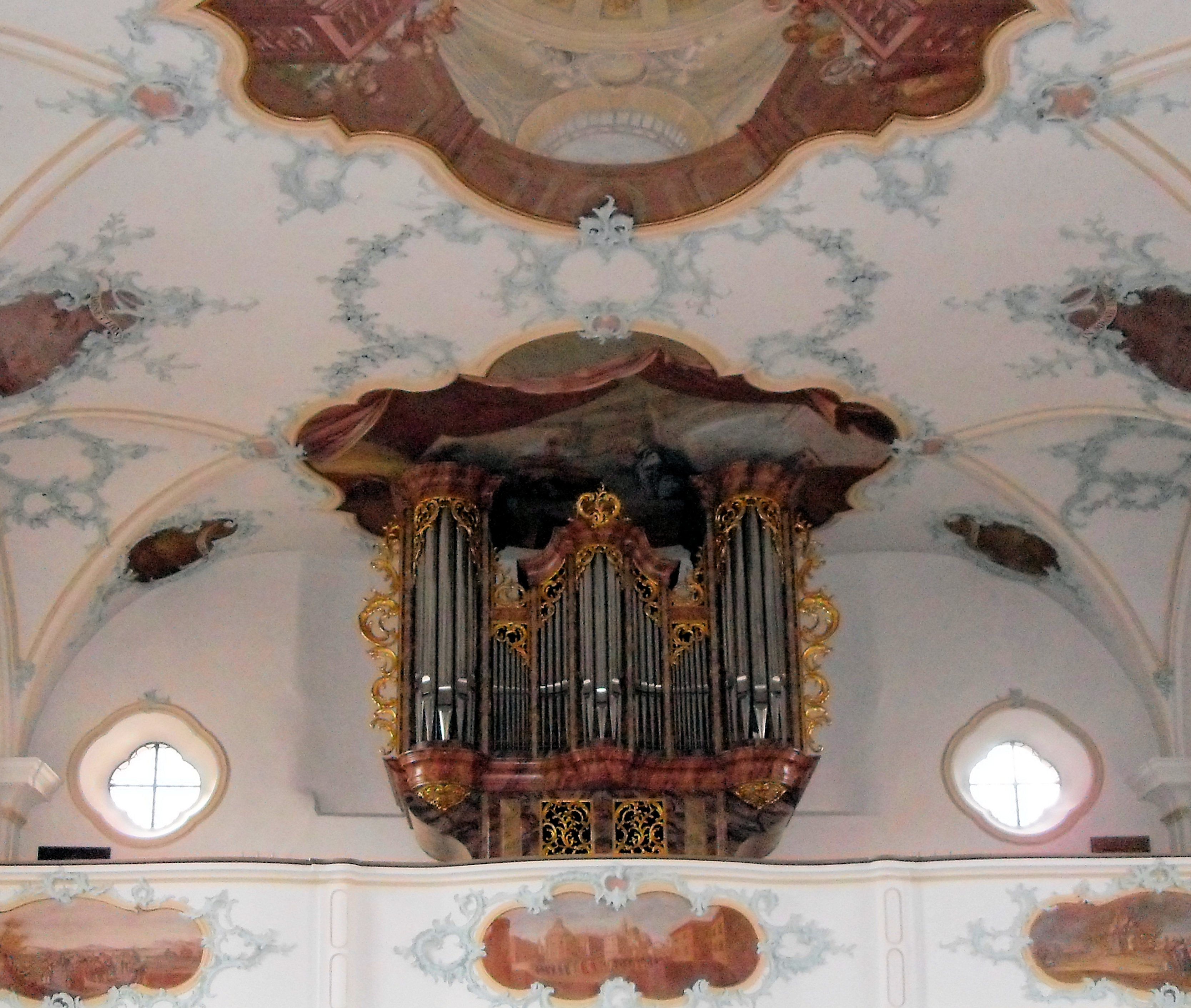 Orgel der Pfarrkirche St. Remigius in Mettau, Kanton Aargau, Schweiz